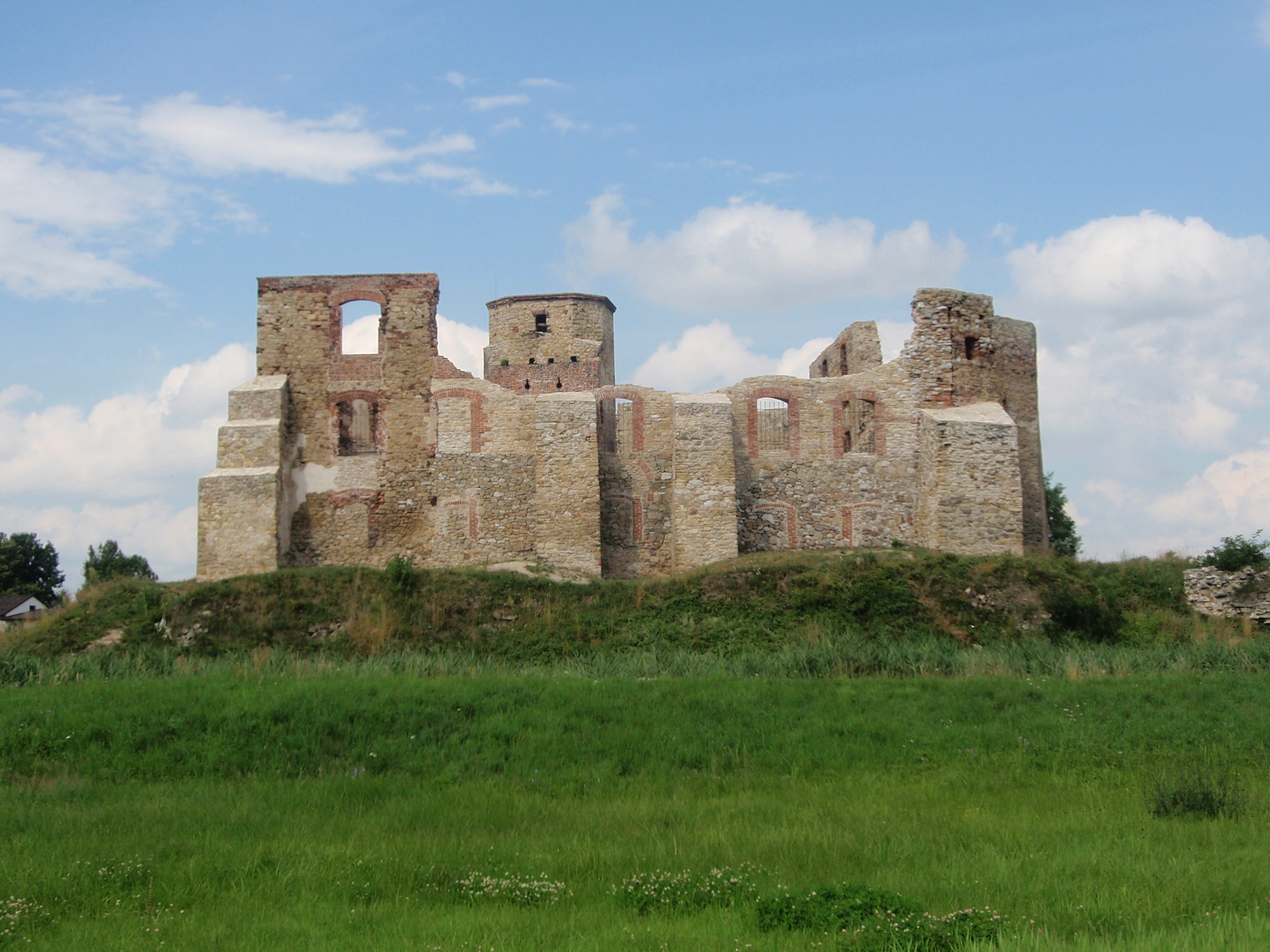 Zamek w Siewierzu